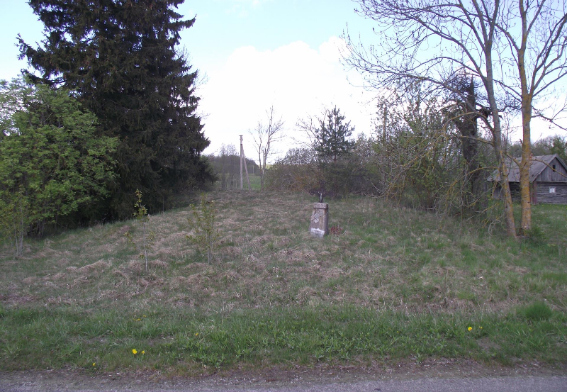 Maksvyčių kaimo senosios kapinės